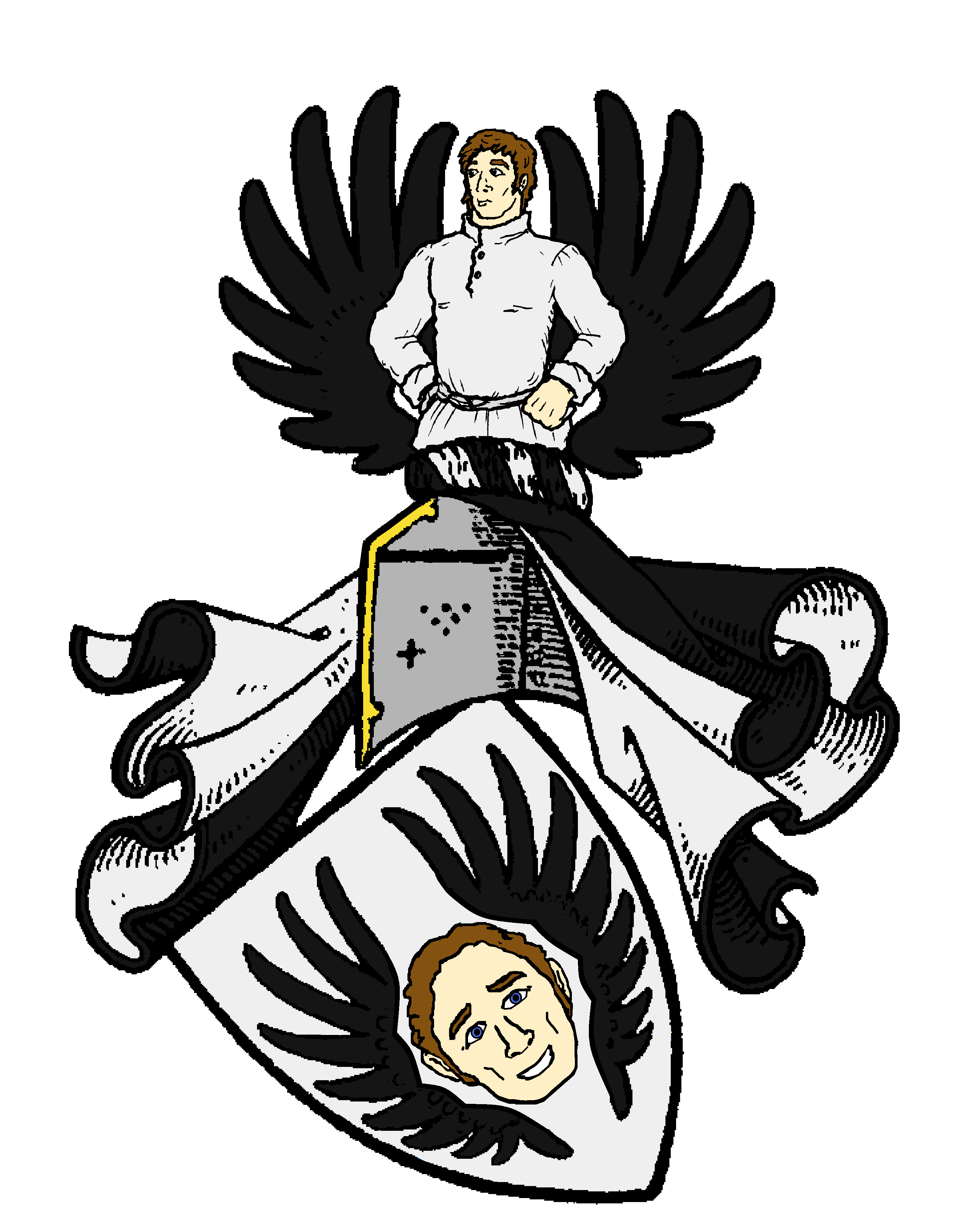 Stammwappen der uradligen, mecklenburg-hinterpommerschen v. Parsenow